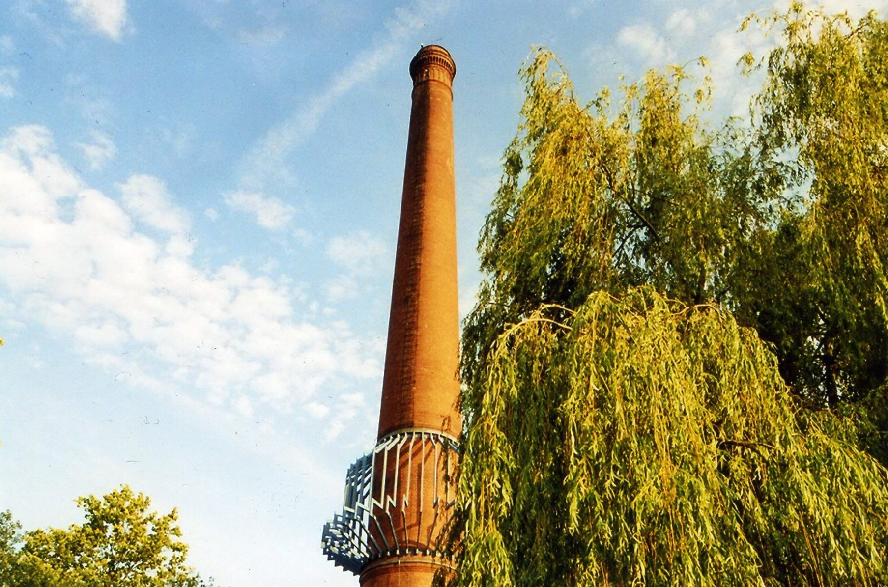 Detail auf dem Campus der Universität Kassel